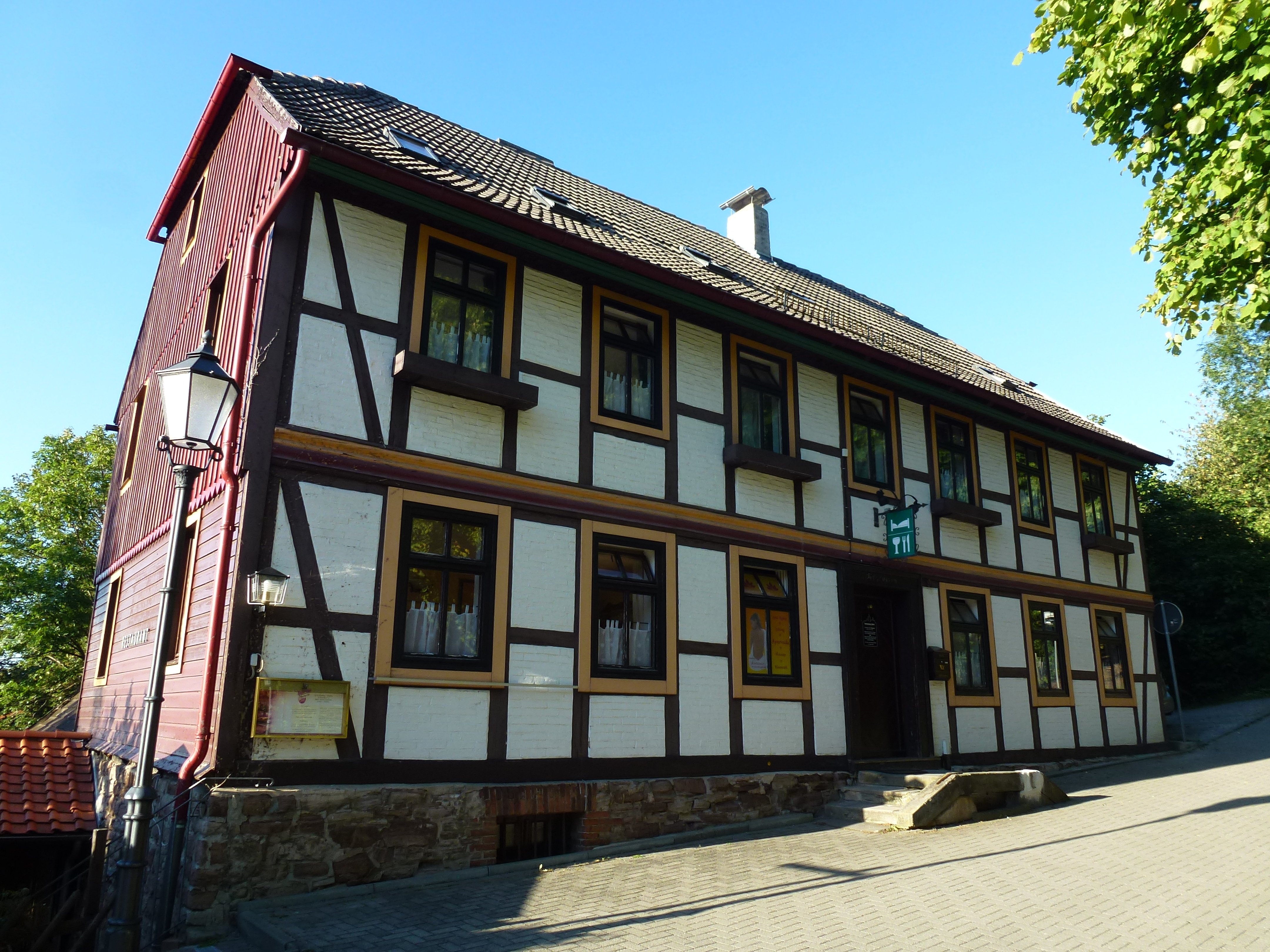 Fachwerkhaus Burgberg 9b in Wernigerode. Mitte des 18. Jahrhunderts als Wohnhaus für die Kammerboten des Grafen unterhalb des Schlosses errichtet, seit 1993/1994 als Restaurant und Hotel genutzt.